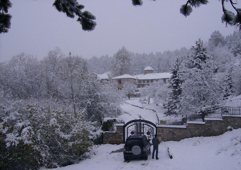 Voskopoja